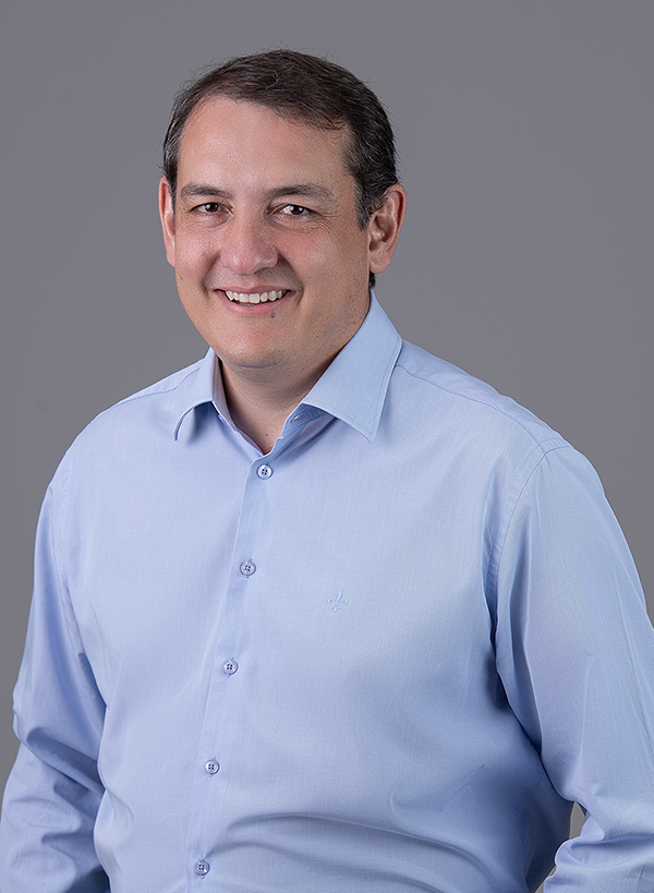 Foto tirada durante a campanha eleitoral de 2018 no Brasil